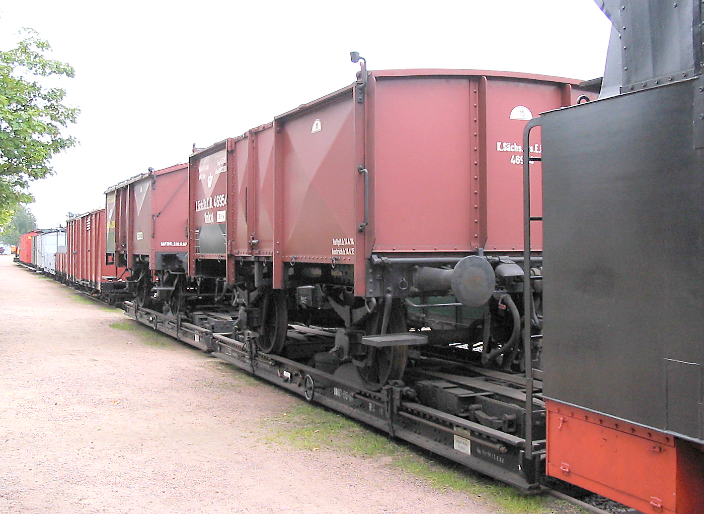 Bahnhof Radebeul Ost: Am Alten Güterboden; 2 Normalspurwagen auf Schmalspur-Rollwagen. Radebeul, Sachsen, Deutschland.